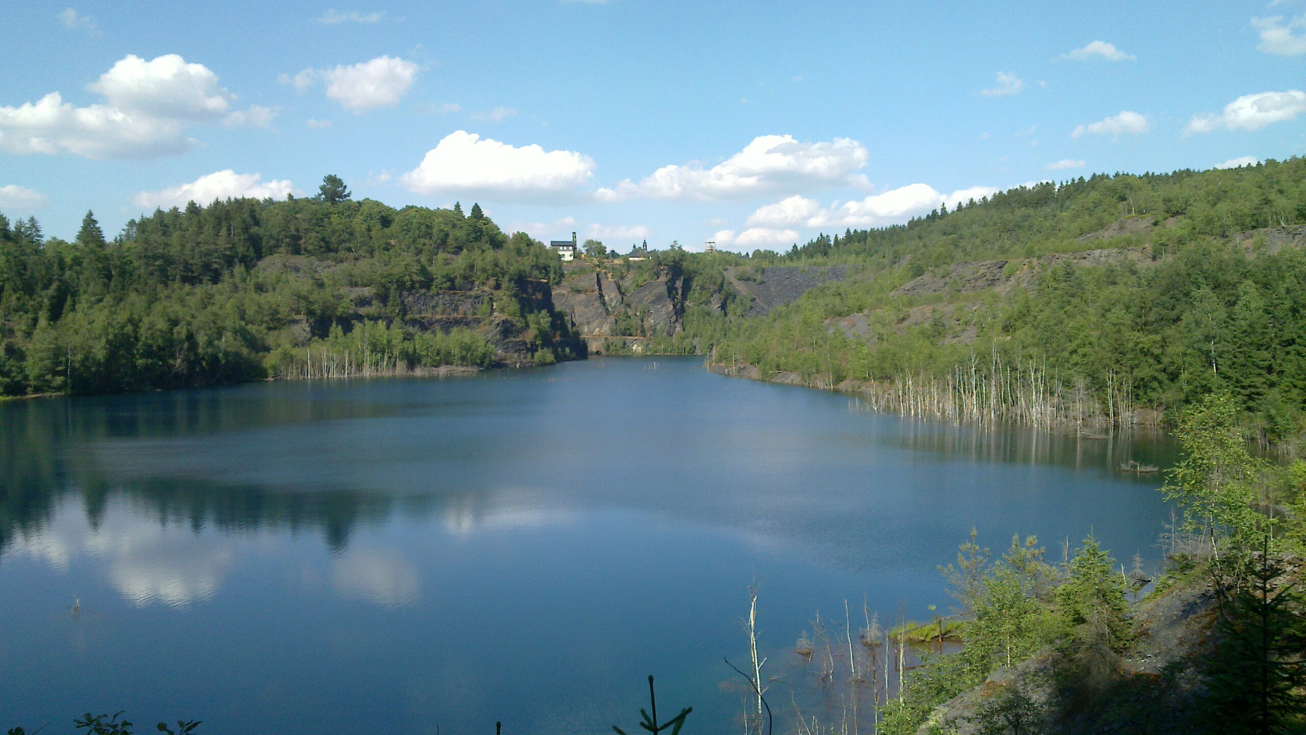 Schieferpark Lehesten - See im ehemaligen Bergwerksbereich und ehemalige Bergwerksgebaeude